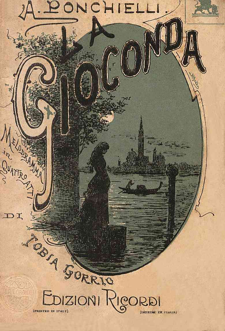 Copertina del libretto d'opera "La Gioconda" melodramma in 4 atti di Tobia Gorrio, musiche di A.Ponchilelli - edizioni Ricordi 1916